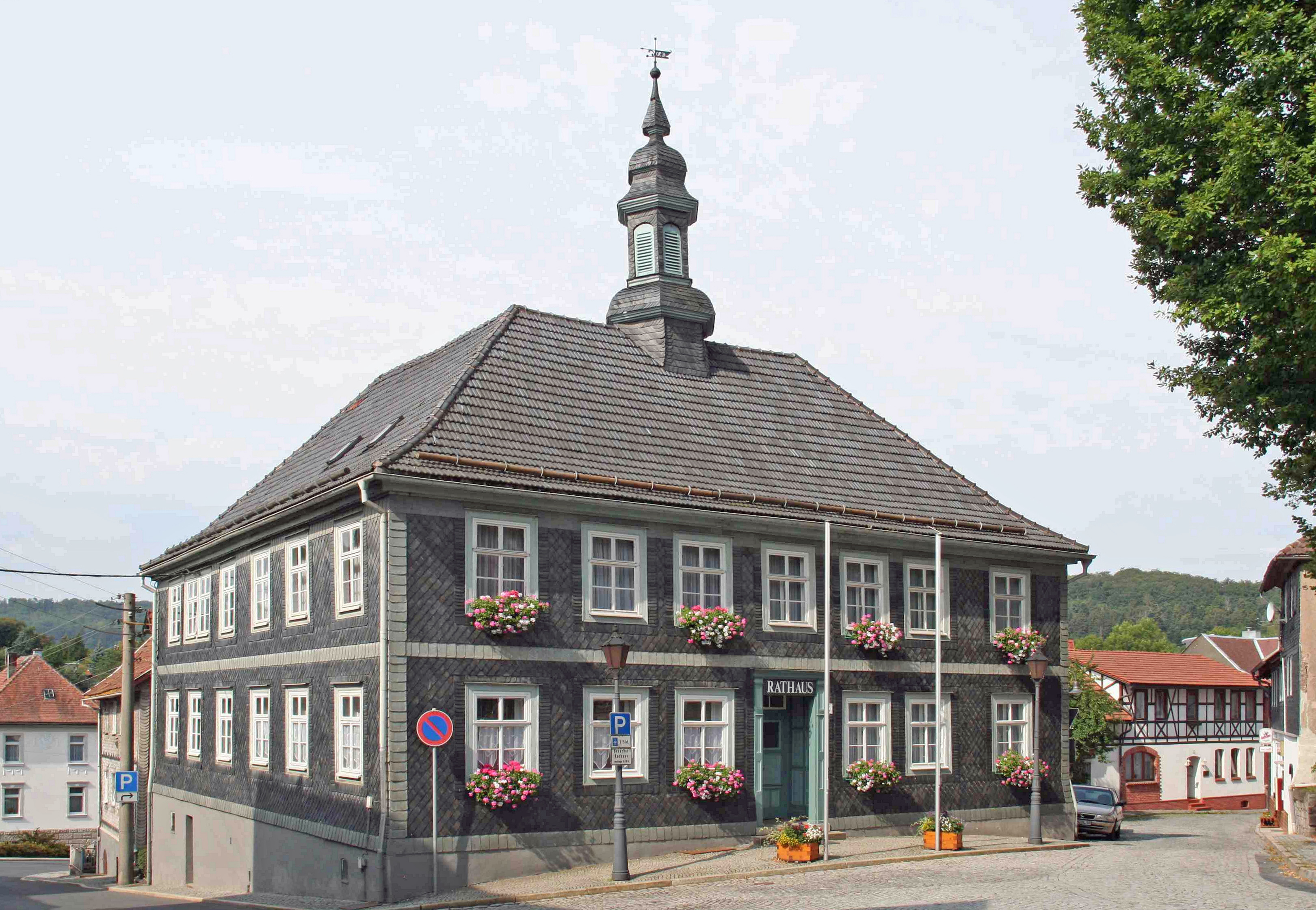 Rathaus Schalkau, Landkreis Sonneberg